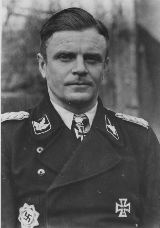 Scherl Bilderdienst: Neuer Schwertträger Der Führer verlieh das Eichenlaub mit Schwertern zum Ritterkreuz des Eisernen Kreuzes an SS-Brigadeführer und Generalmajor der Waffen-SS Heinz Harmel, Kommandeur der SS-Panzer-Division "Frundsberg" als 116. Soldaten der deutschen Wehrmacht [Verleihung am 15. Dezember 1944]. 19.1.1945 [Herausgabedatum]